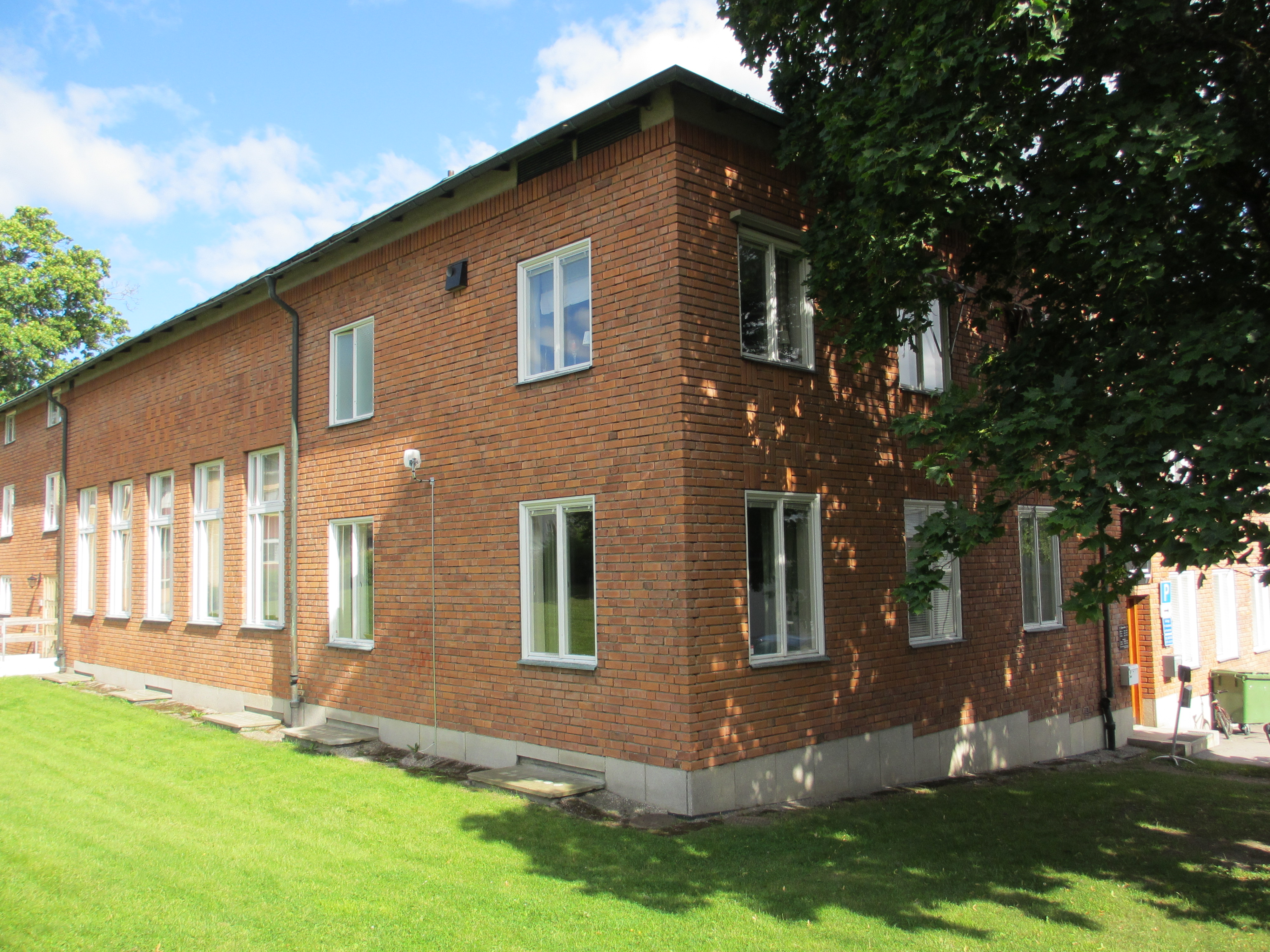 Tingshuset i Söderhamn, den del där de s.k. tingshusmorden ägde rum den 1 mars 1971.